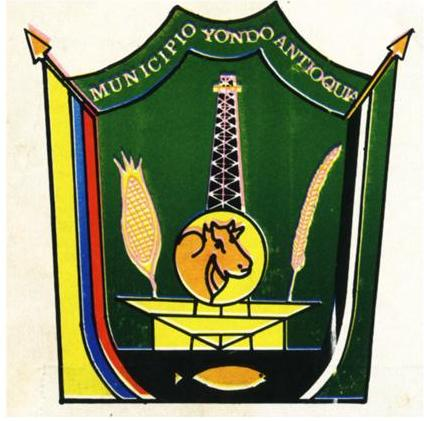 es el escudo